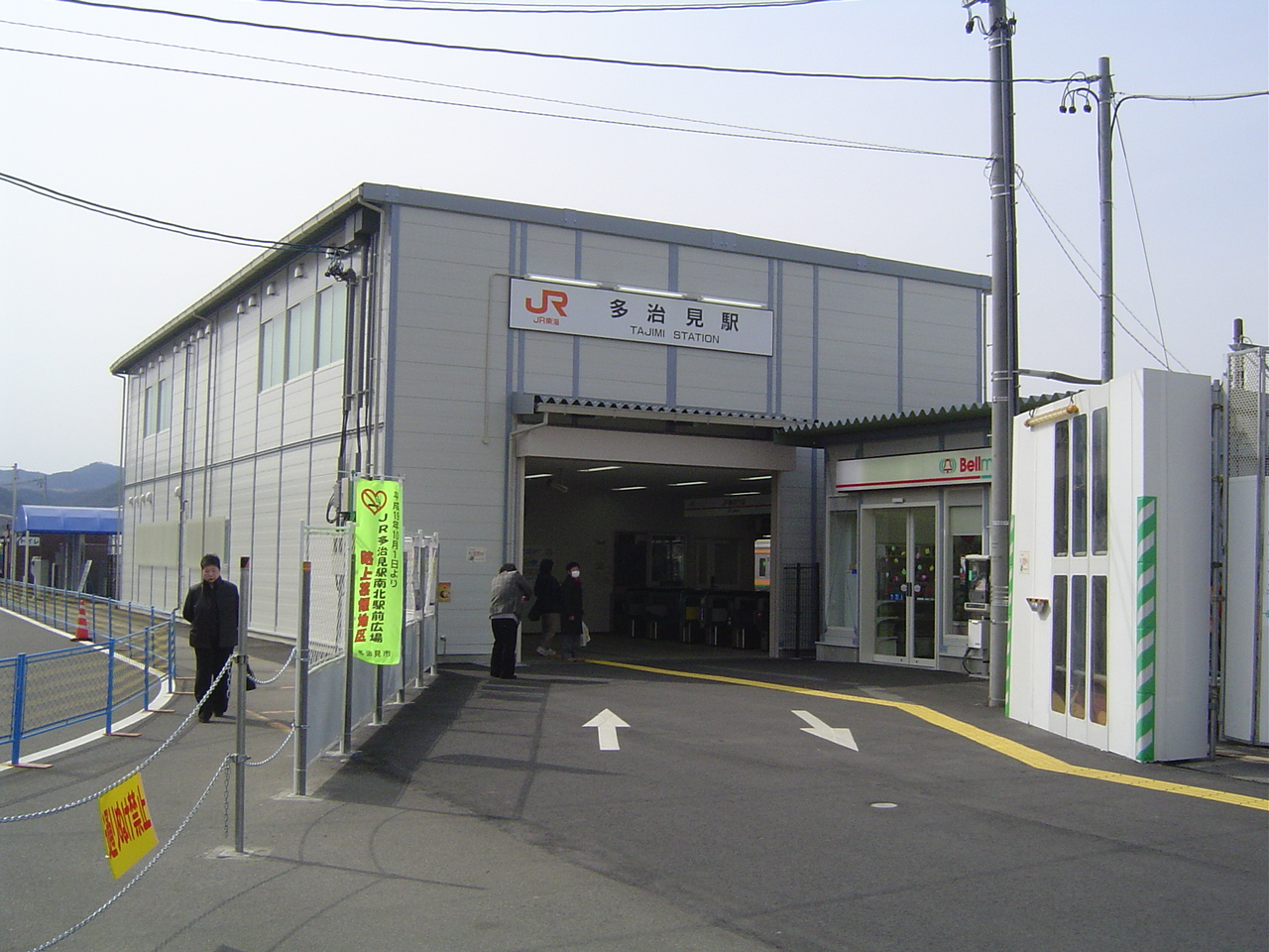 JR東海中央本線多治見駅仮駅舎